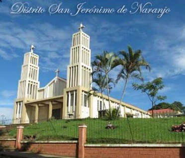 Templo Católico de San Jerónimo de Naranjo